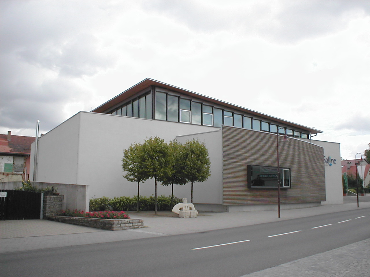 Veranstaltungszentrum „Saline“ in Offenau